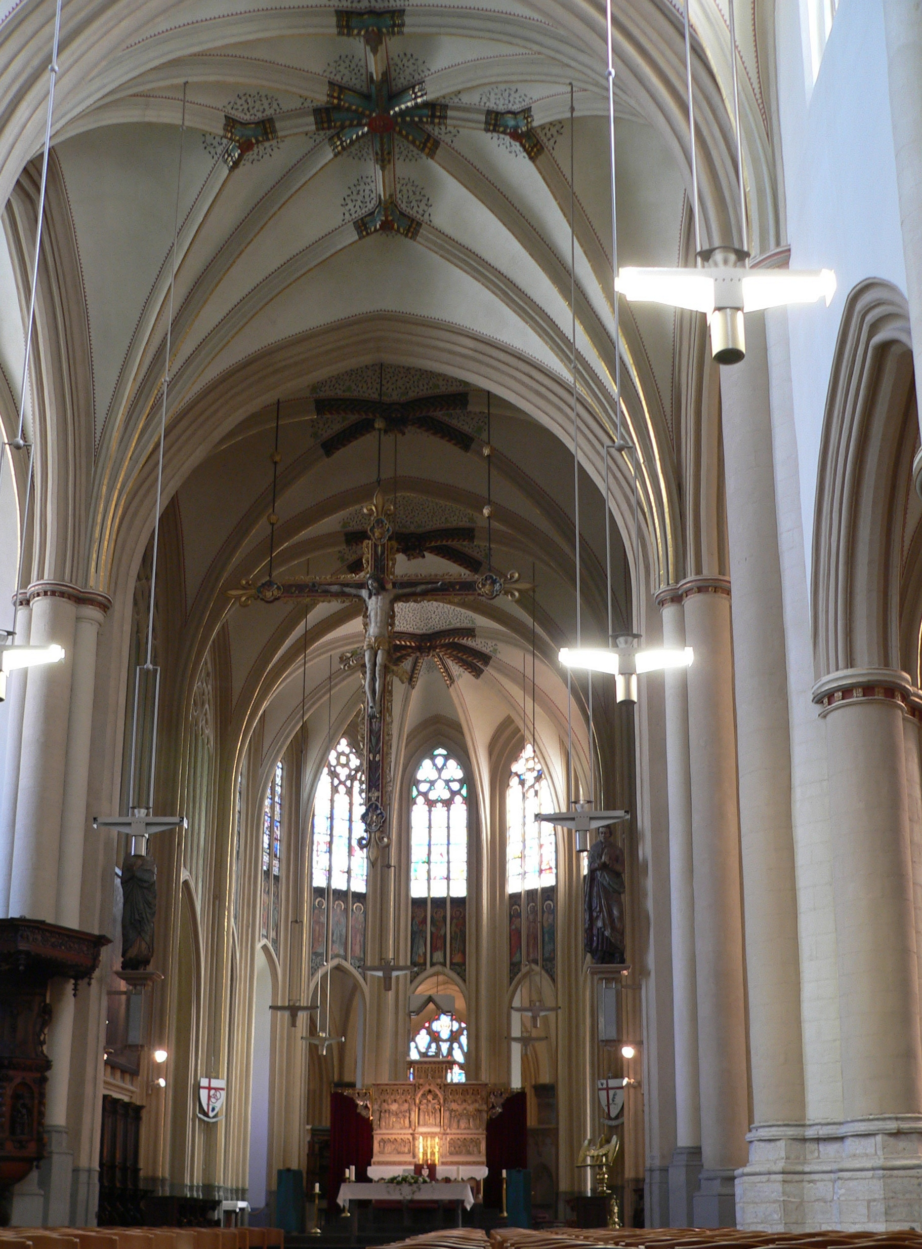 Chor in der Sint-Quintinus-Kathedrale in Hasselt - Belgien